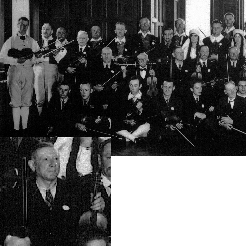 Sven Thörn vid spelmanstämman i Lund 1934